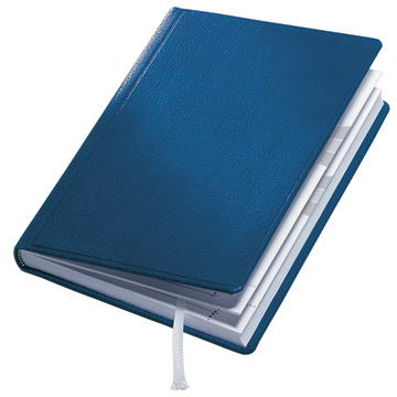 Пример ежедневника